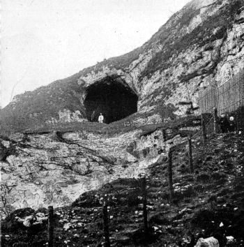 Martinshöhle am Burgberg bei Letmathe um 1900.